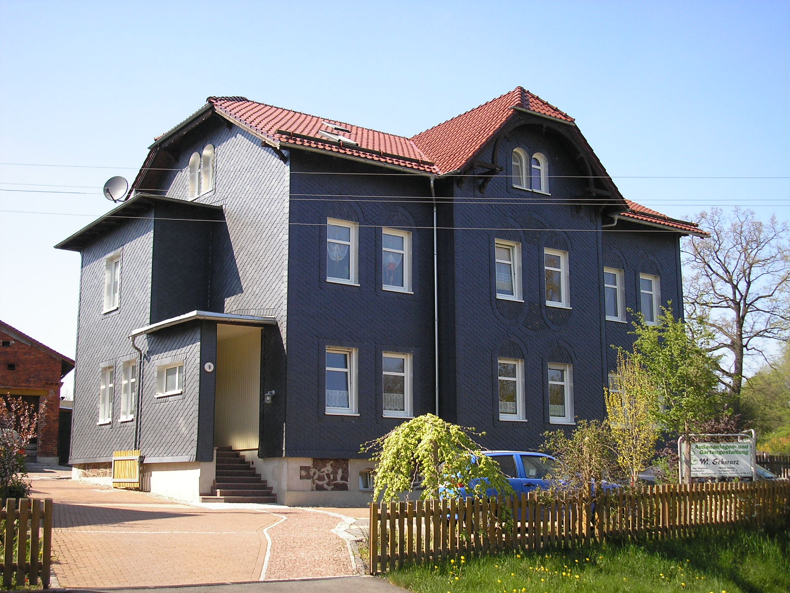 Eine alte Villa in Gehren (Thüringen)(ehem. Verwaltungsgebäude des staatl. Forstwirtschaftsbetriebes Ilmenau, Sitz Gehren) mit der für die Region typischen Fassadenverschieferung als Wetterschutz.